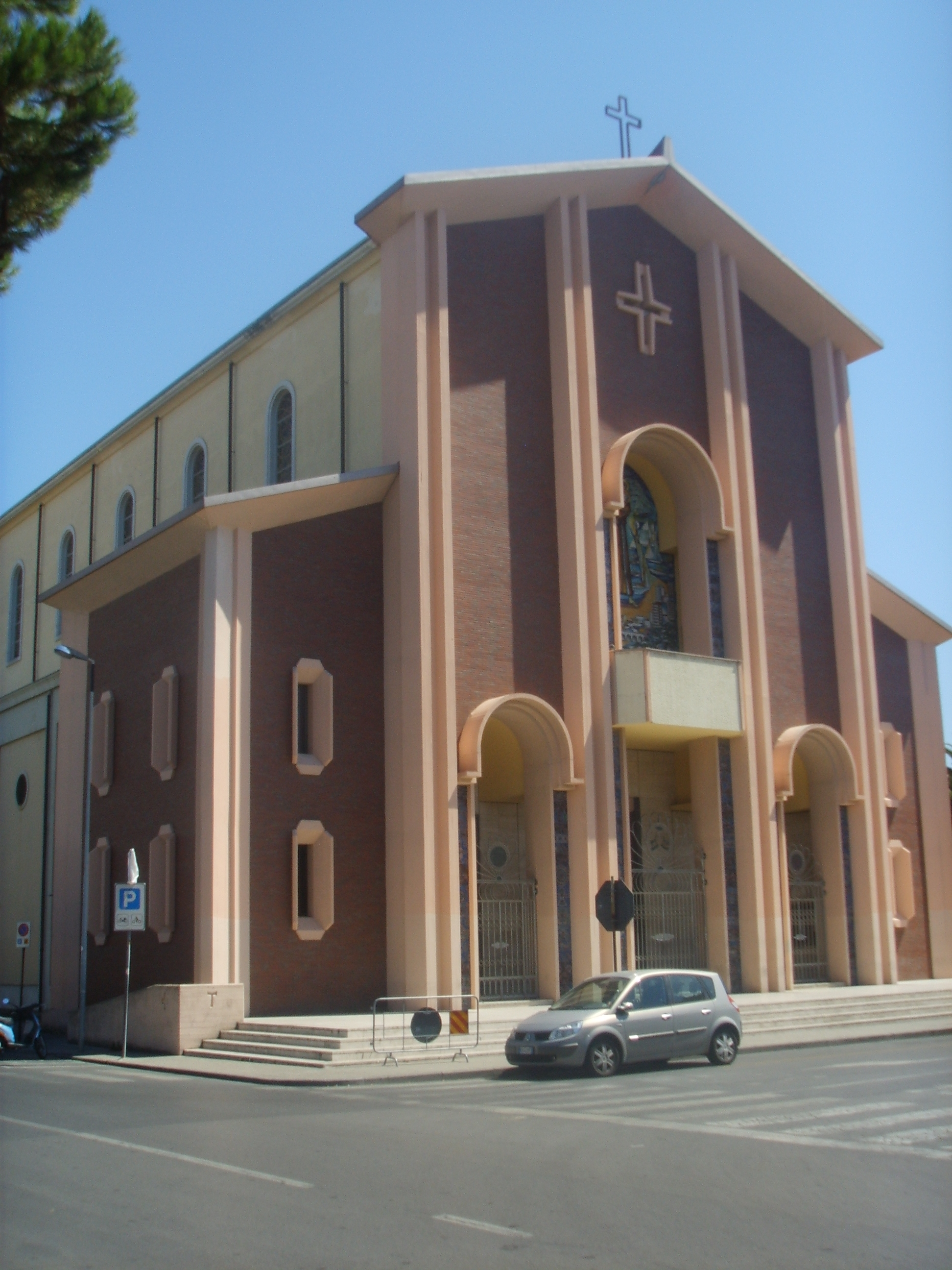 Chiesa di Viareggio